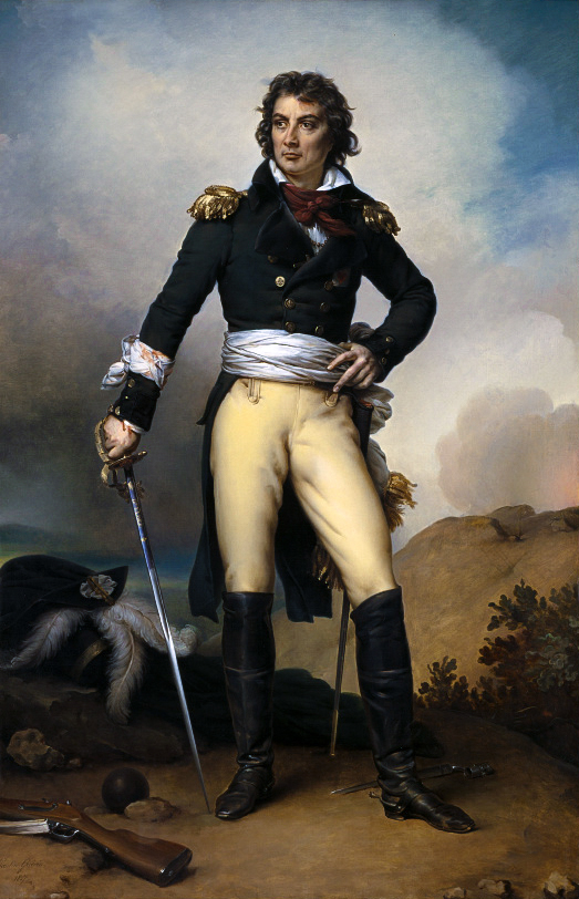 Maurice Joseph Louis Gigost d'Elbée (1752-1794), général des armées vendéennes